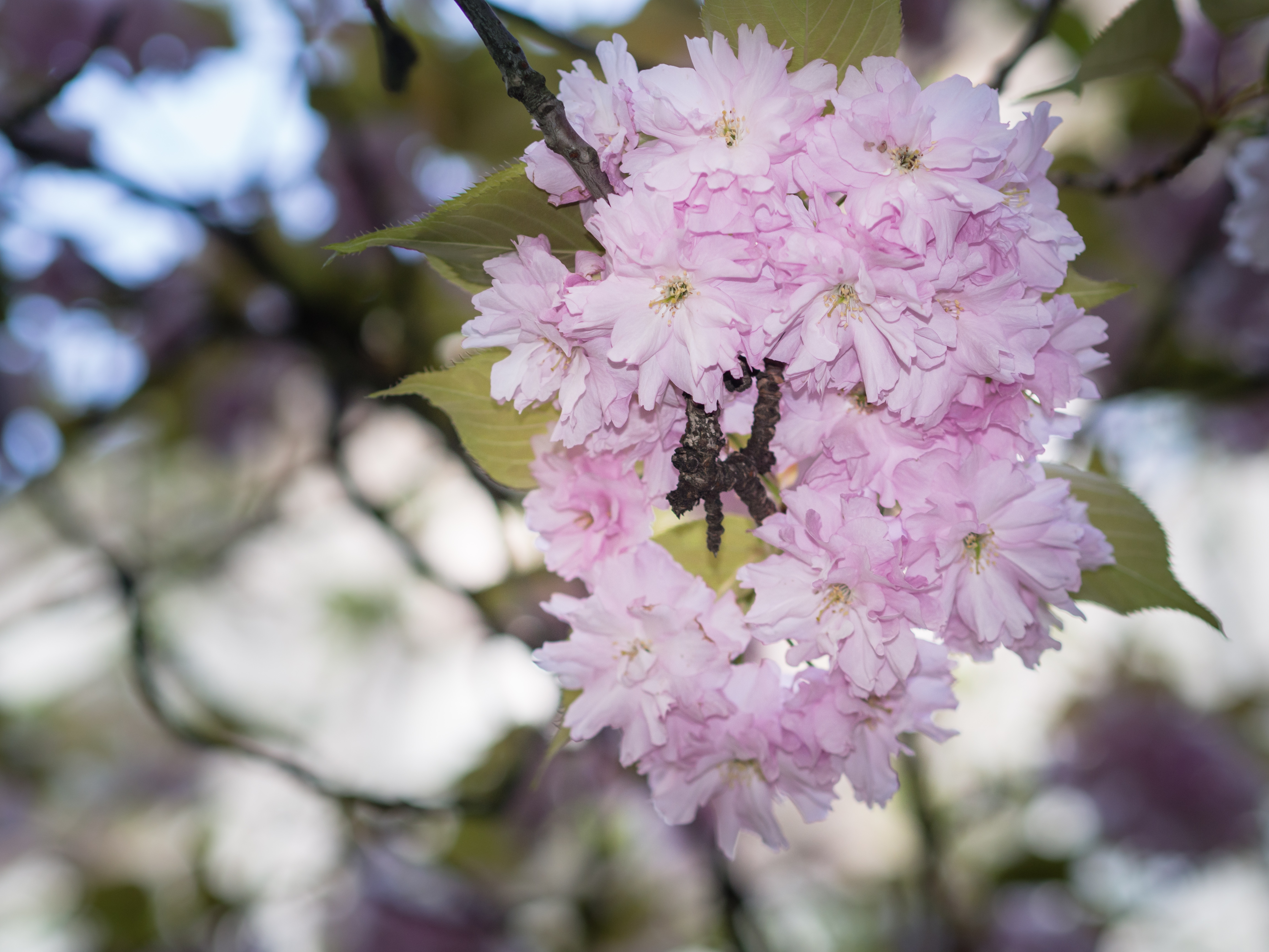 Zierkirsche